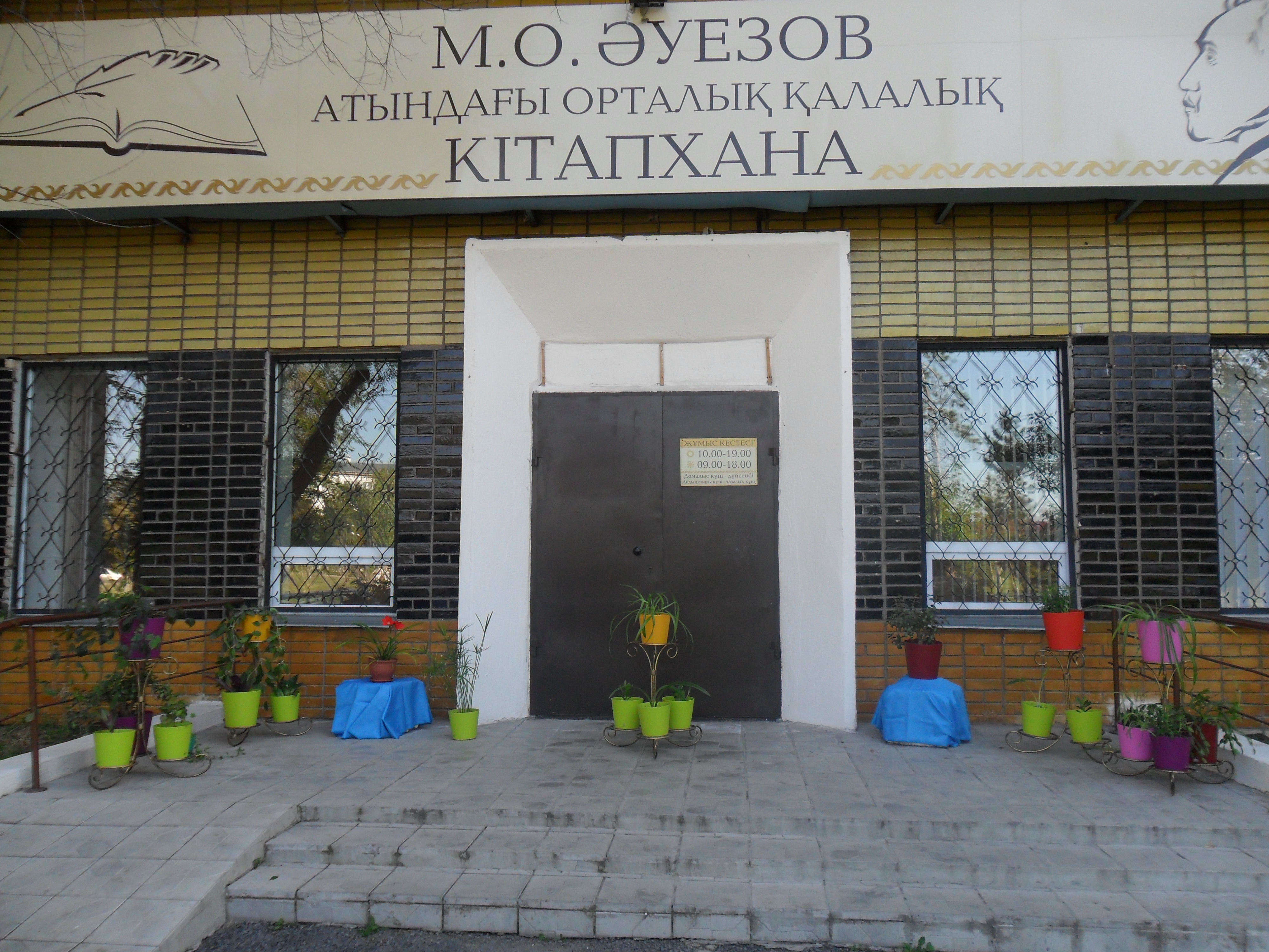 М.О.Әуезов атындағы Орталық қалалық кітапхана ғимараты